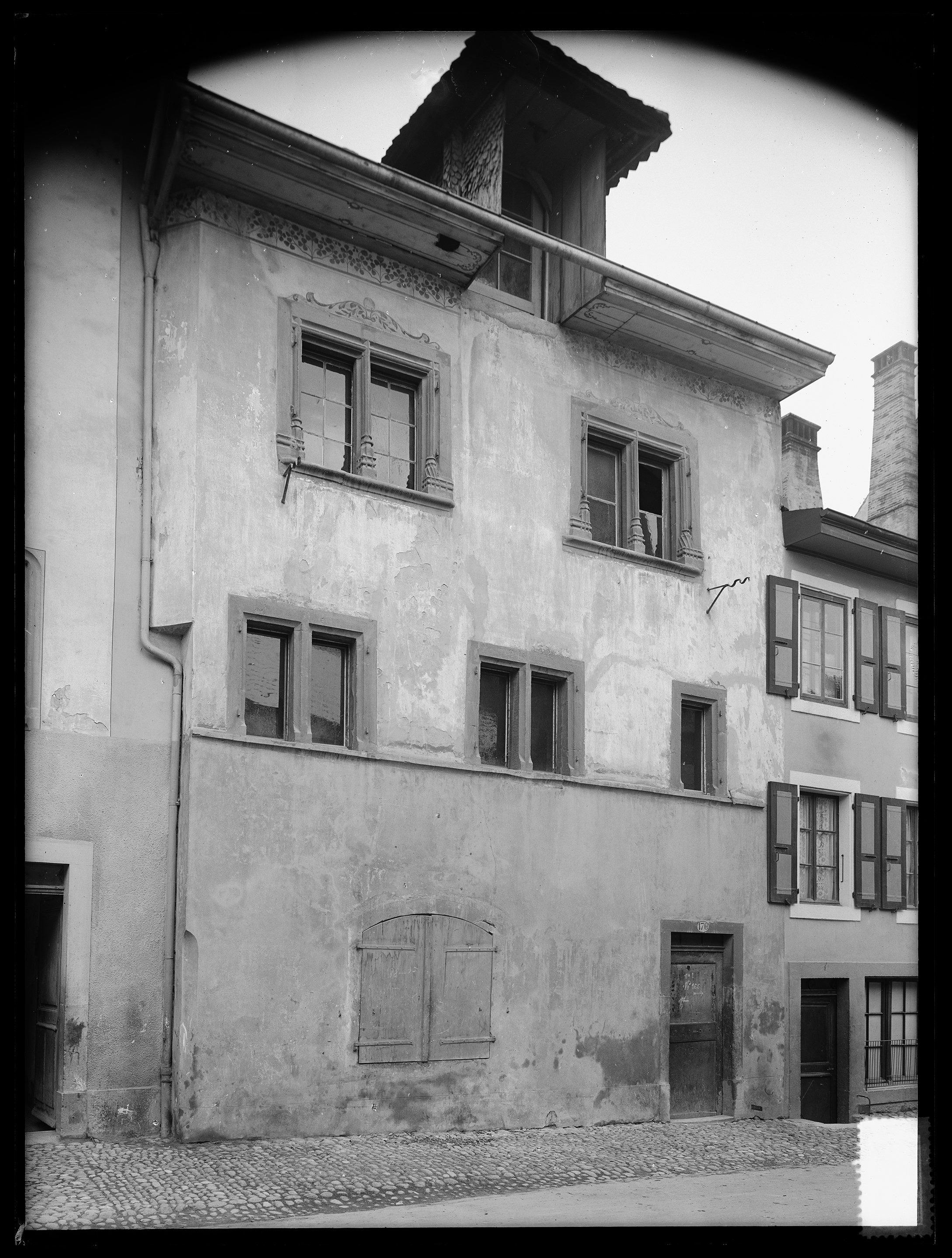 1 cliché de la façade, côté rue, de la bâtisse.